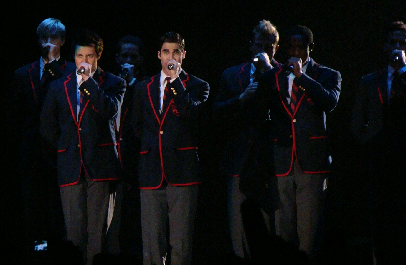 Teenage Dream